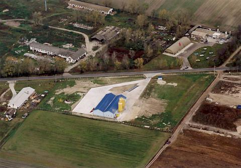 Tököl, Hungary, aerialphotgraphy